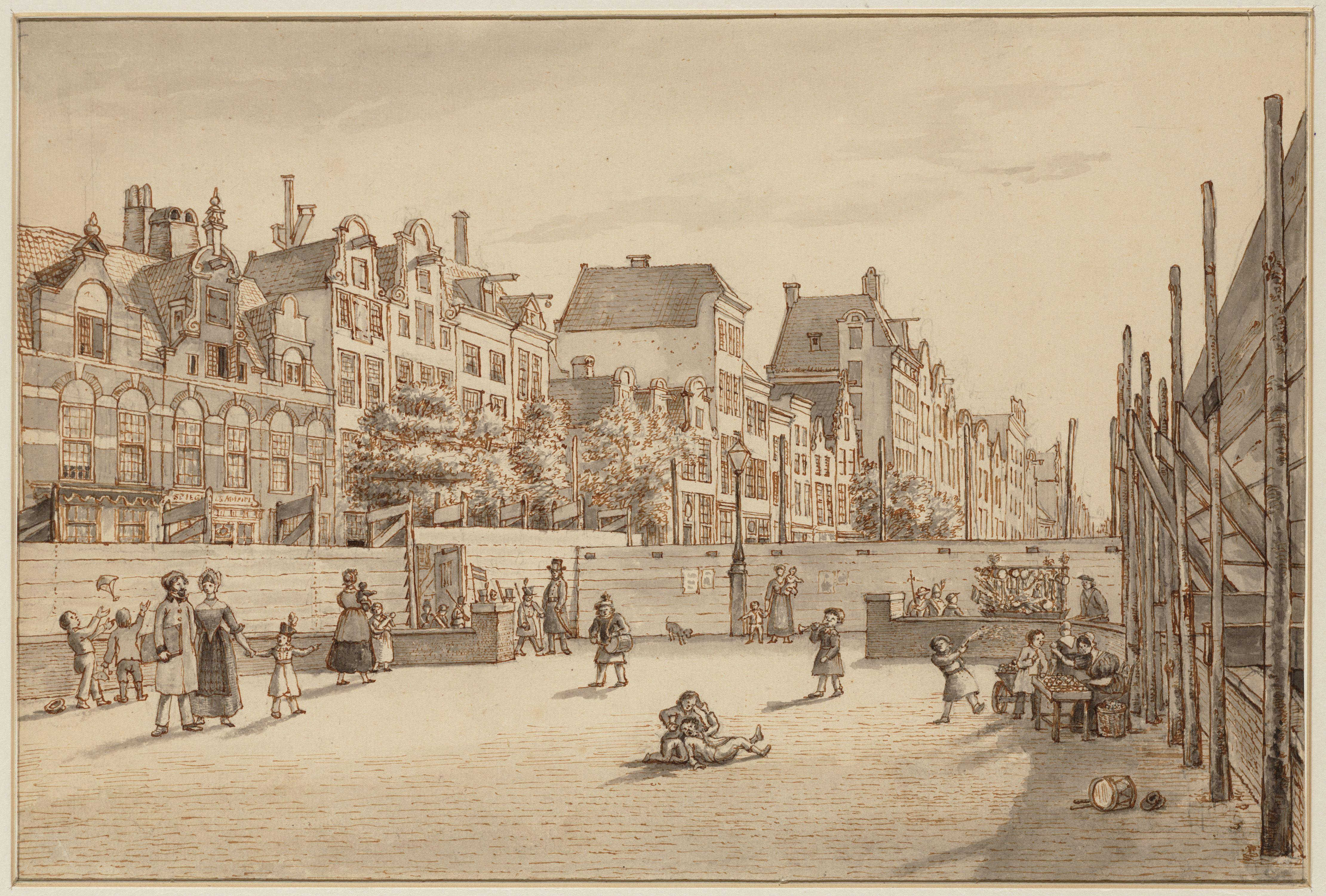 Beschrijving Het terrein van de gesloopte Beurs van Hendrick de Keyer, bedoeld als hulpbeurs (tussen 1836 en 1845) met snoepkraampjes en "beurstrommelen" ter gelegenheid van een kermis Op de achtergrond Rokin 9-23 (ca.). Documenttype tekening Vervaardiger Lamberts, Gerrit Collectie Collectie Stadsarchief Amsterdam: tekeningen en prenten Datering 1845 ca. Geografische naam Rokin Beurspleintje Inventarissen Afbeeldingsbestand 010097010366